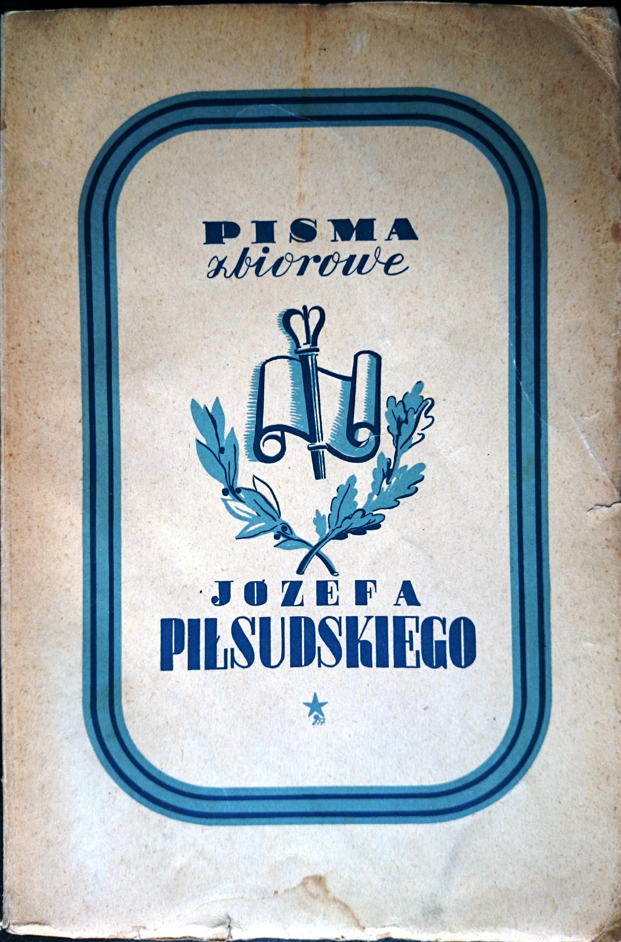 Okładka każdego z 10 tomów pism zbiorowych Józefa Piłsudskiego, wydanych w latach 1937–1938